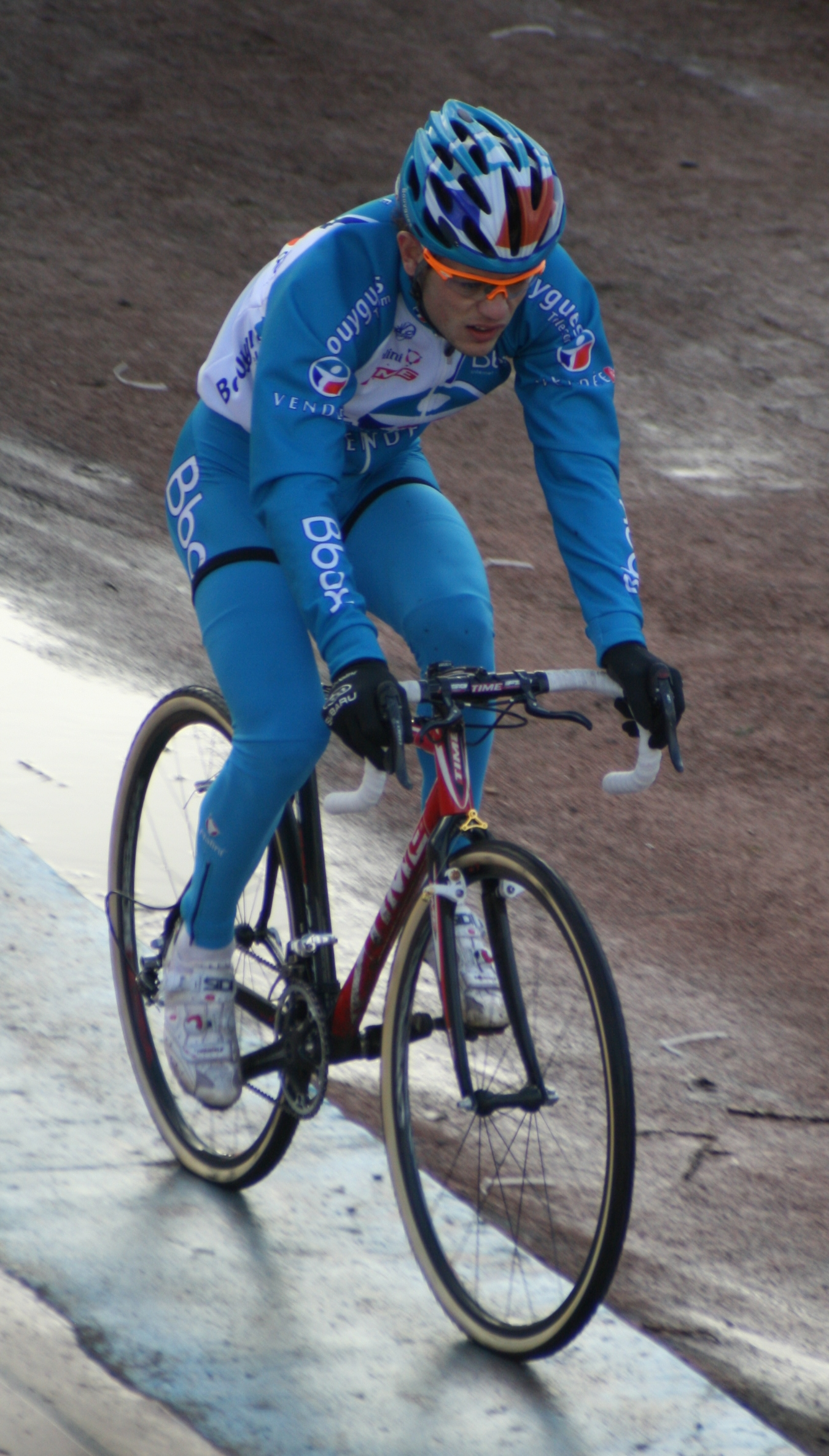 Steve Chainel, au cyclo-cross de Roubaix en 2009